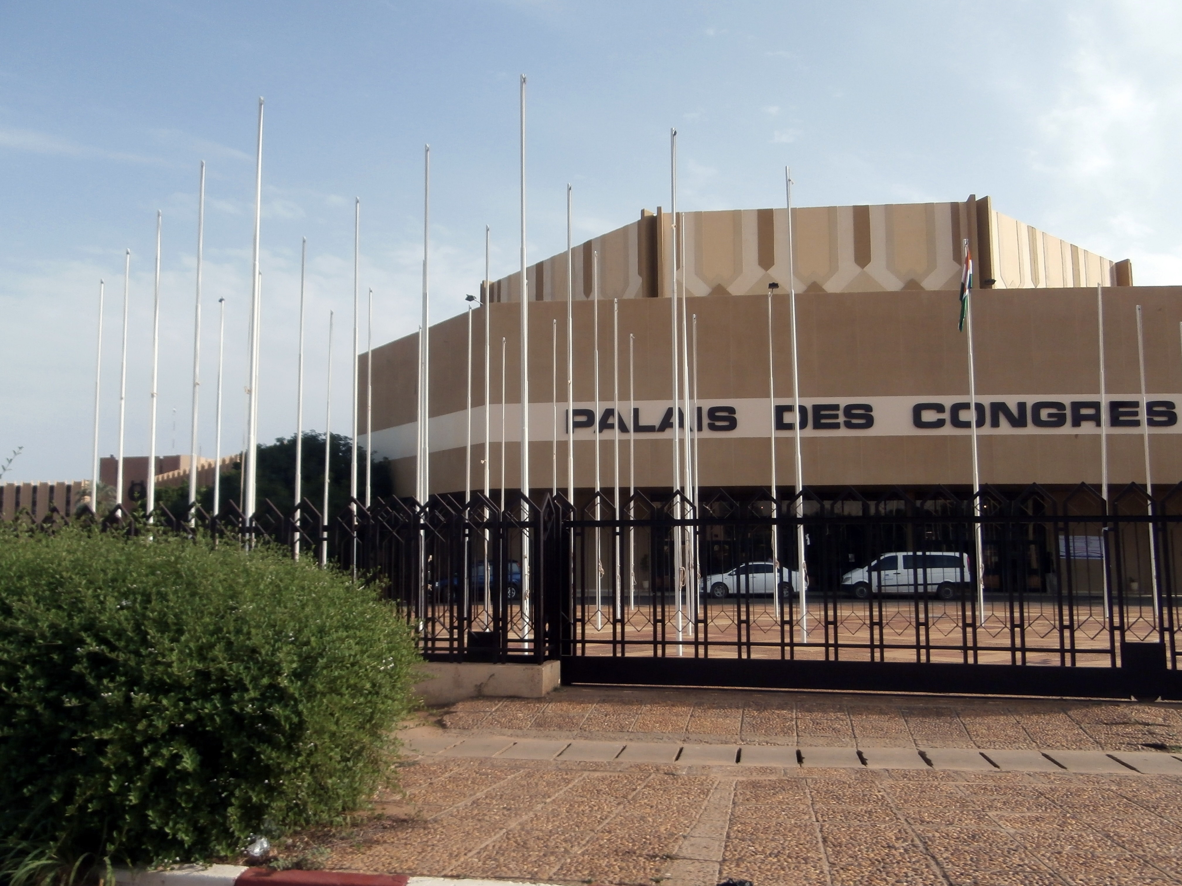 Palais des Congres